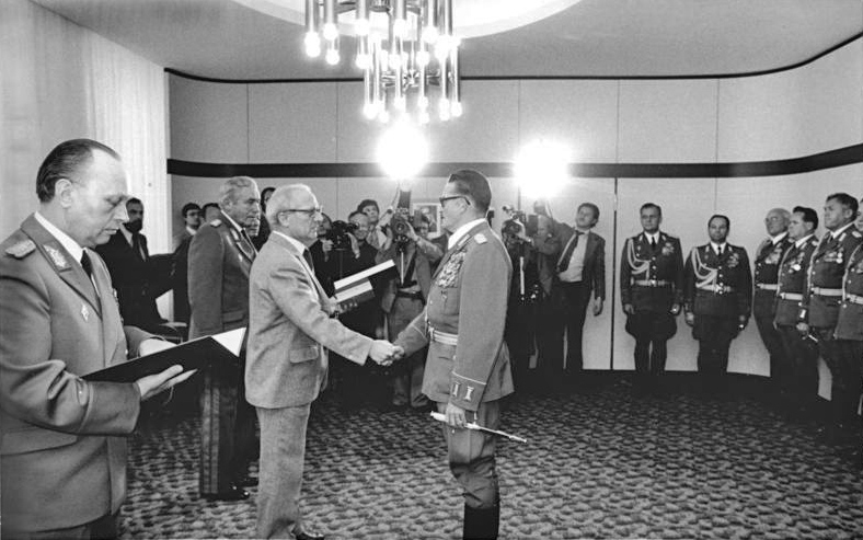 Berlin, Ernennung von Generalen ADN-ZB Franke 2.10.80 Berlin: Ernennung von Generalen- Der Generalsekretär des ZK der SED und Vorsitzende des Staatsrates der DDR, Erich Honecker, ernannte Generale der NVA und der Grenztruppen der DDR, -Vorabmotiv, frei mit der ADN-Meldg.